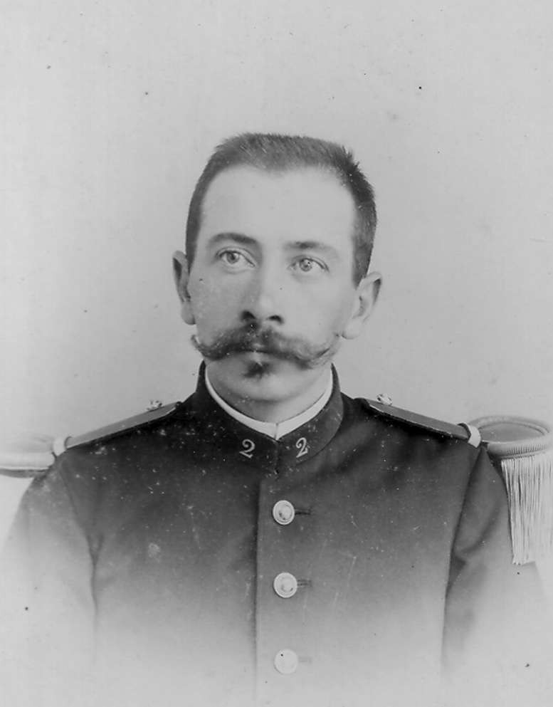 Capitaine pendant la Première guerre mondiale